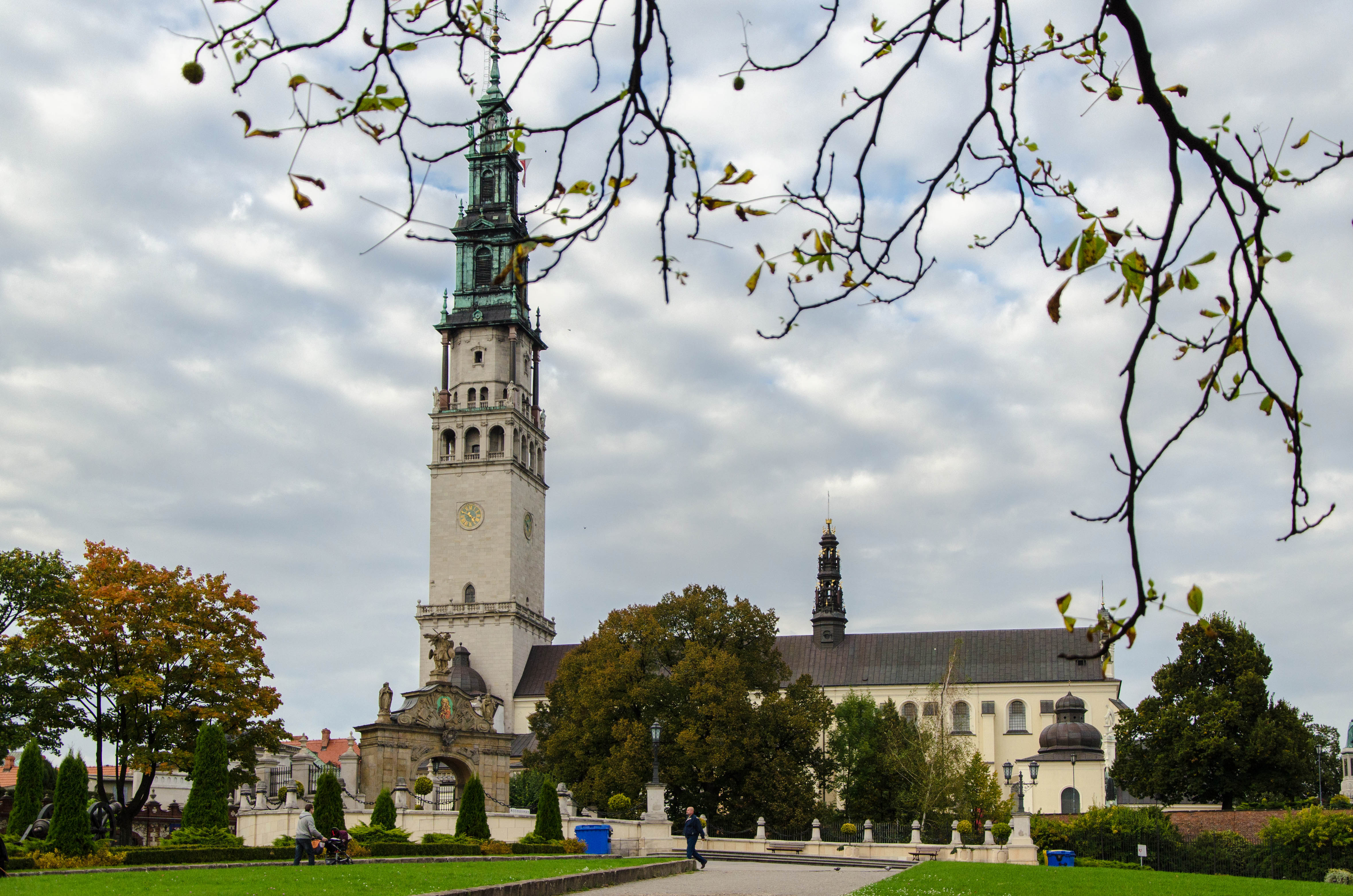 Częstochowa, zespół klasztorny paulinów na Jasnej Górze